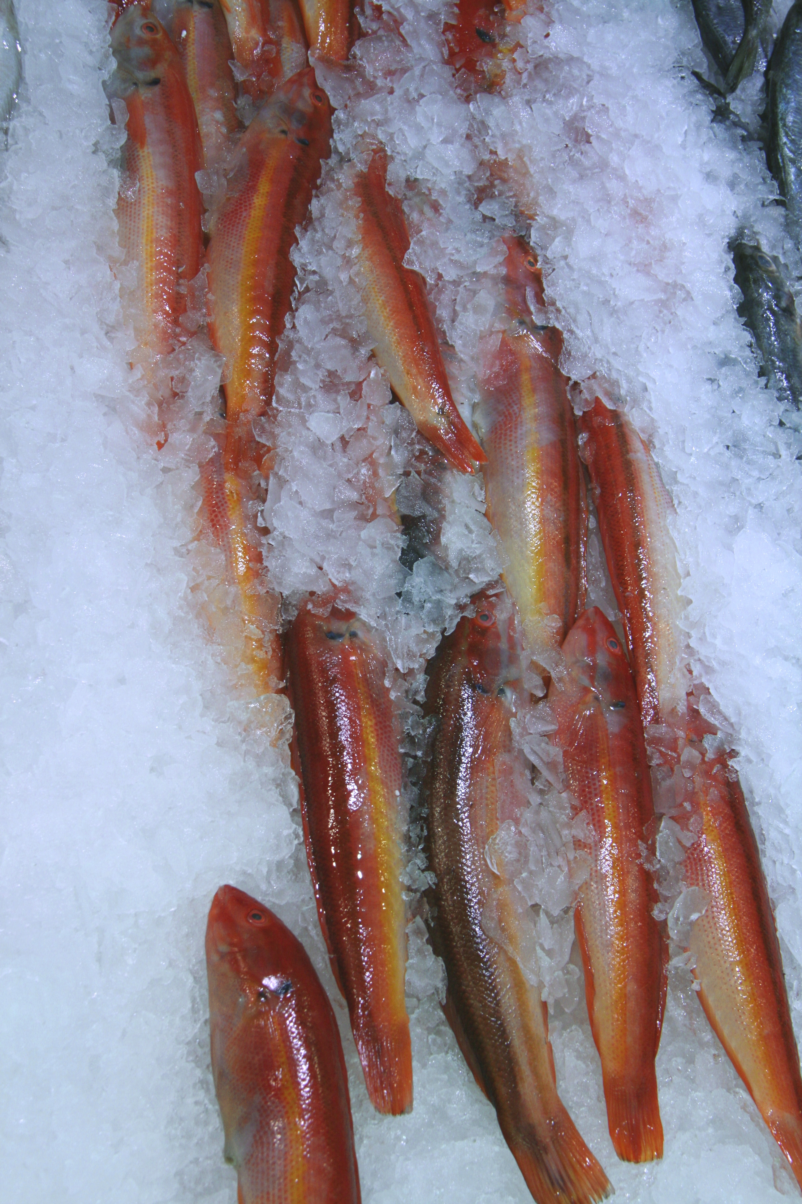 Doncellas de Galicia